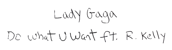 Logotipo del sencillo de Lady Gaga "Do What U Want".